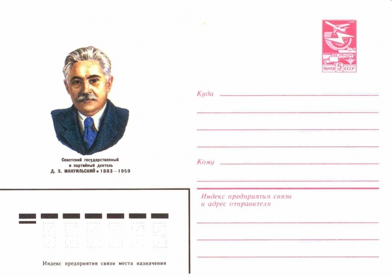 Художественные маркированные конверты 1983 года.